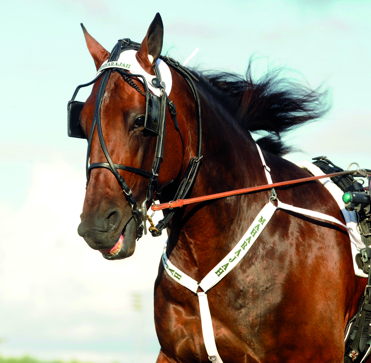 Travhästen Maharajah.